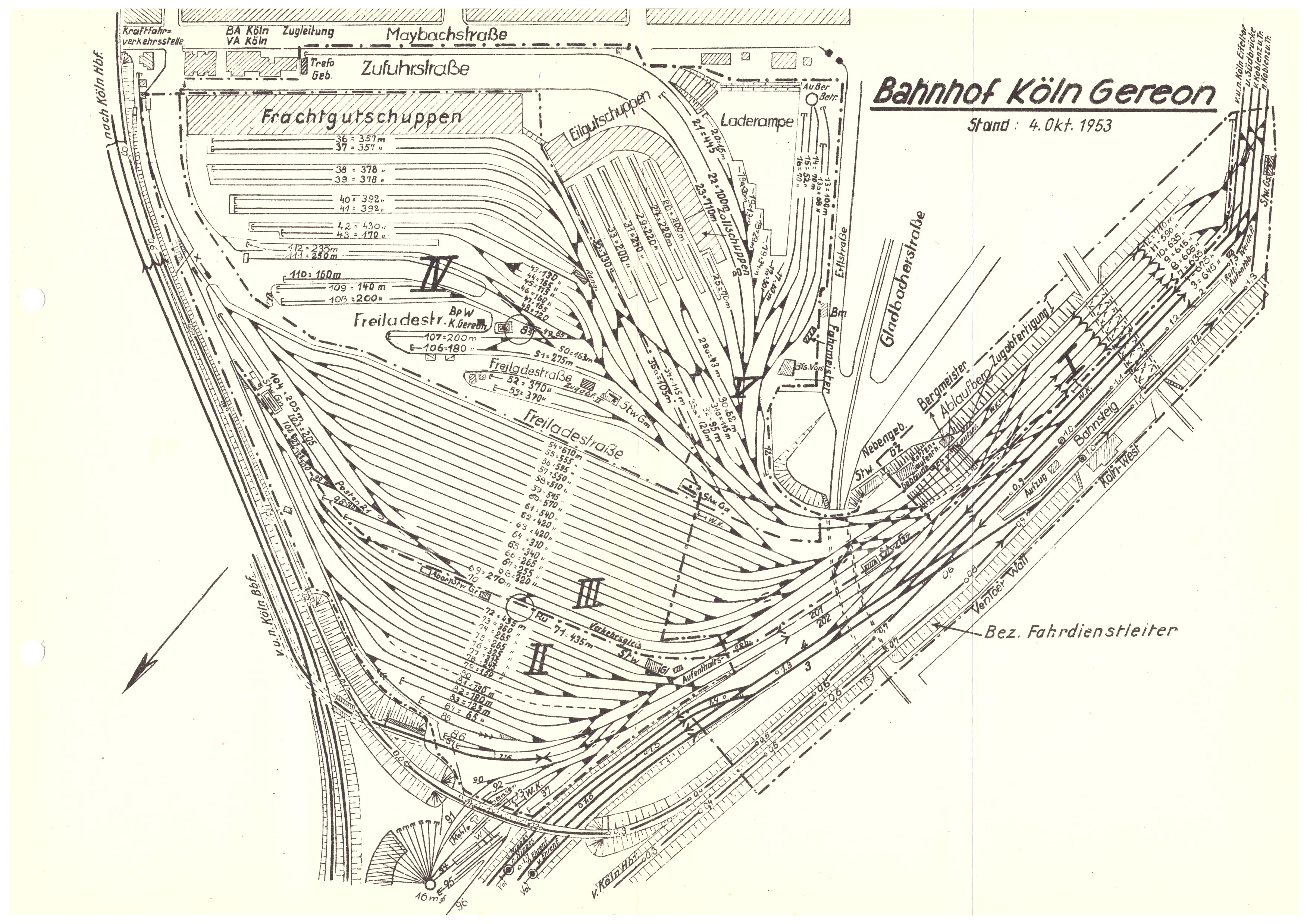 Norden ist links unten. Die römischen Ziffern bezeichnen die fünf einzelnen Bezirke des Gbf Gereon. Die beiden nicht beschrifteten Streckengleise links unten (links neben der 16-m-Drehscheibe) kommen von Ehrenfeld und Nippes, sie überqueren das sogenannte Schlundgleis von Gereon nach Köln Bbf. Gleis 80 ist gestrichelt dargestellt, weil es zwar vorhanden war, seit dem Krieg aber noch nicht wieder befahrbar gemacht wurde. Ganz links oben liegt heute der S-Bahn-Haltepunkt Hansaring. Nahe dem rechten Rand erkennt man den Bahnsteig des Bahnhofs Köln-West, dessen Lage bis heute unverändert ist.